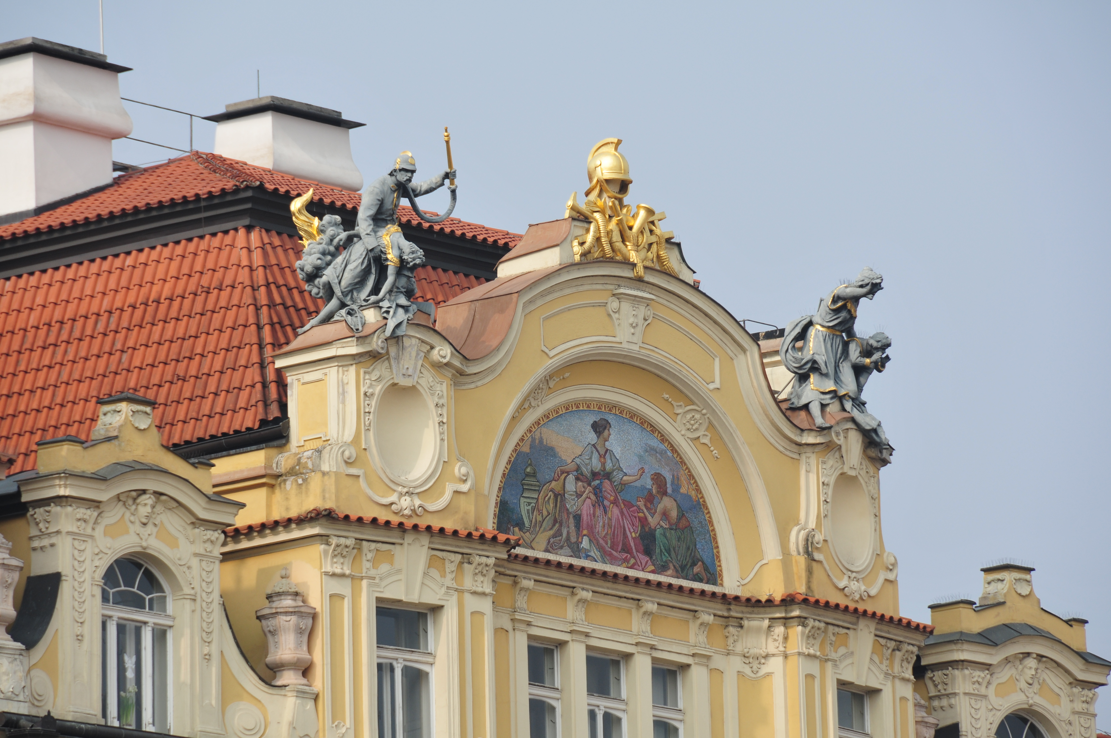 Prag